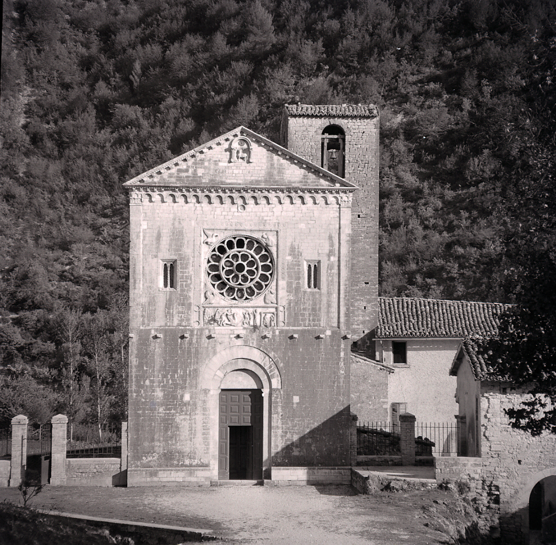 Servizio fotografico : Italia, 1970 / Paolo Monti. - Buste: 1, Fototipi: 3 : Negativo b/n, gelatina bromuro d'argento/ pellicola ; 6x6. - ((Serie costituita da 3 negativi identificati con la numerazione: 13076-13078. Sulla busta manoscritto: "Umbria/ ?". La suddetta serie è contenuta nella scatola identificata con la numerazione R13035-13324. Sul coperchio iscrizione manoscritta a pennarello: "7 Località varie".